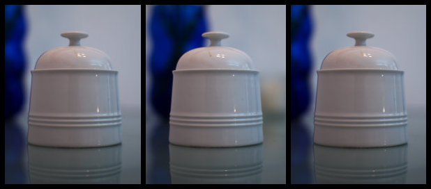 Beispiel für ein Stereobild mit kurzer Brennweite (30mm)